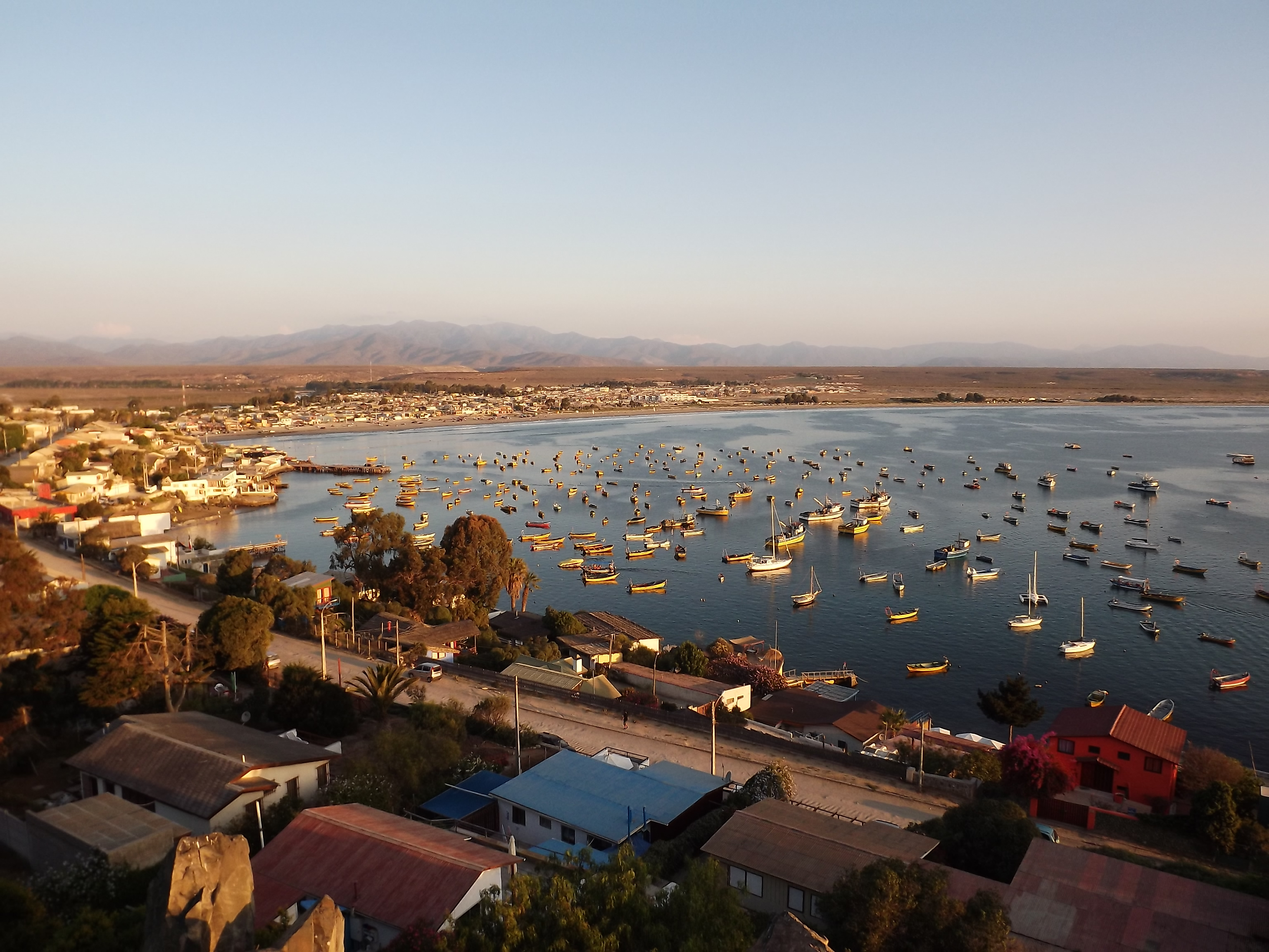 Vista general del balneario de Tongoy, sector el Muelle